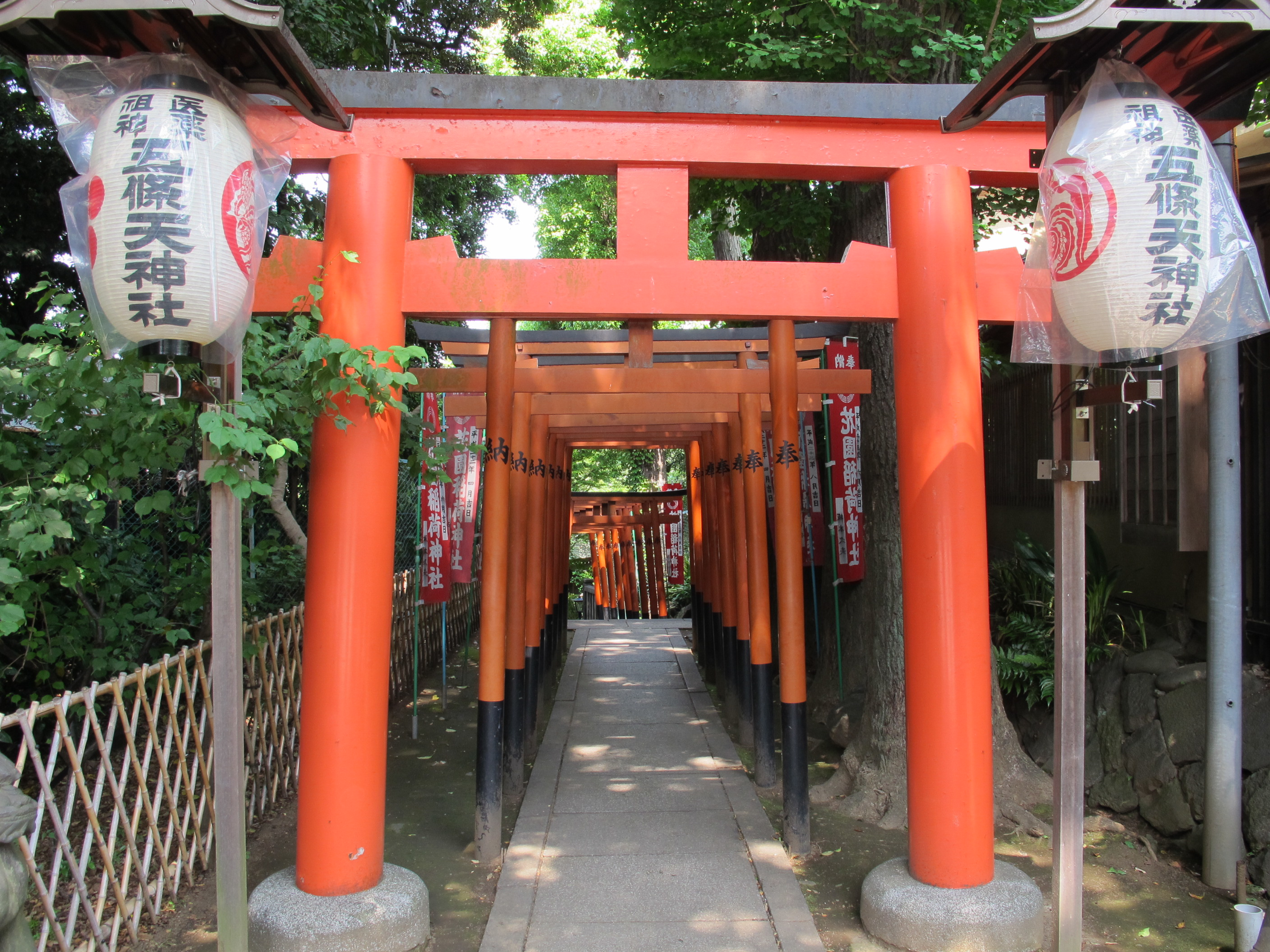 Ueno, gojo-ji